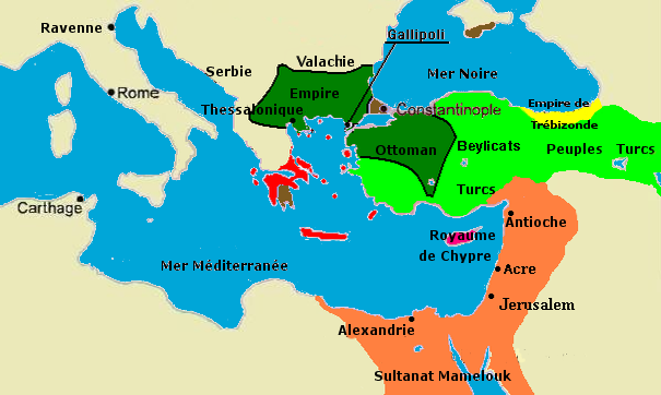 Carte de la Méditerranée orientale vers 1390 avec l'Empire byzantin en marron et les Etats latins de la région en rouge.